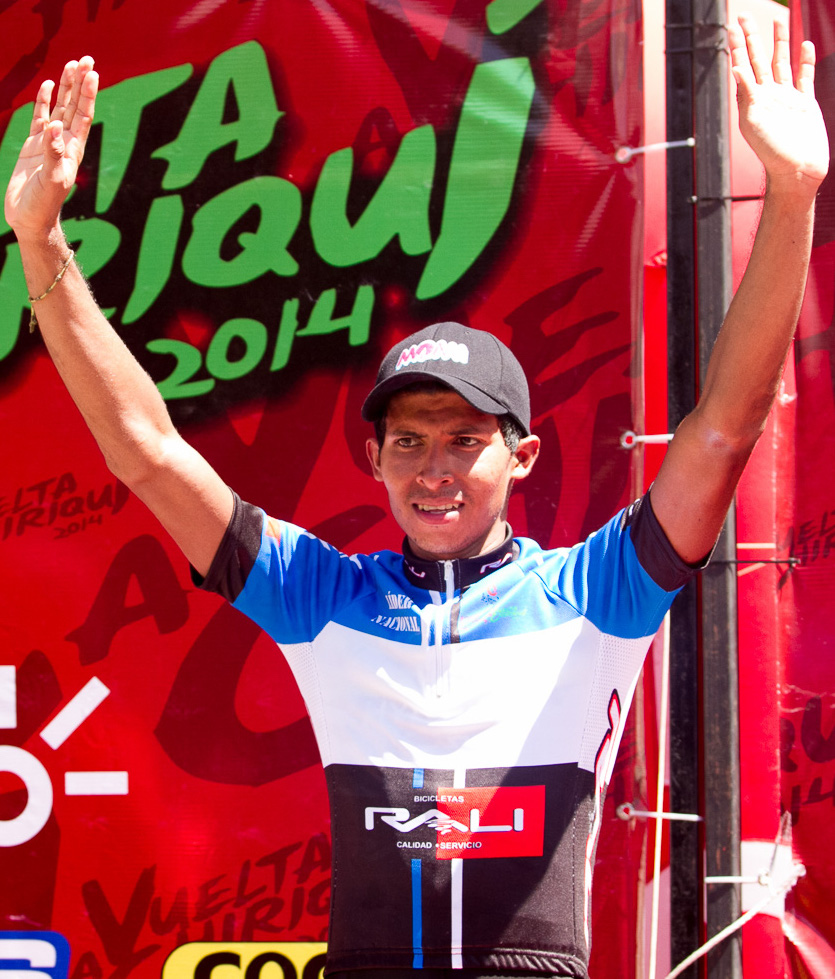 Yelko Gómez en el podio Et4. Vuelta a Chiriquí 2014 David - Concepción - Boquete - David. Lunes 24 de noviembre de 2014